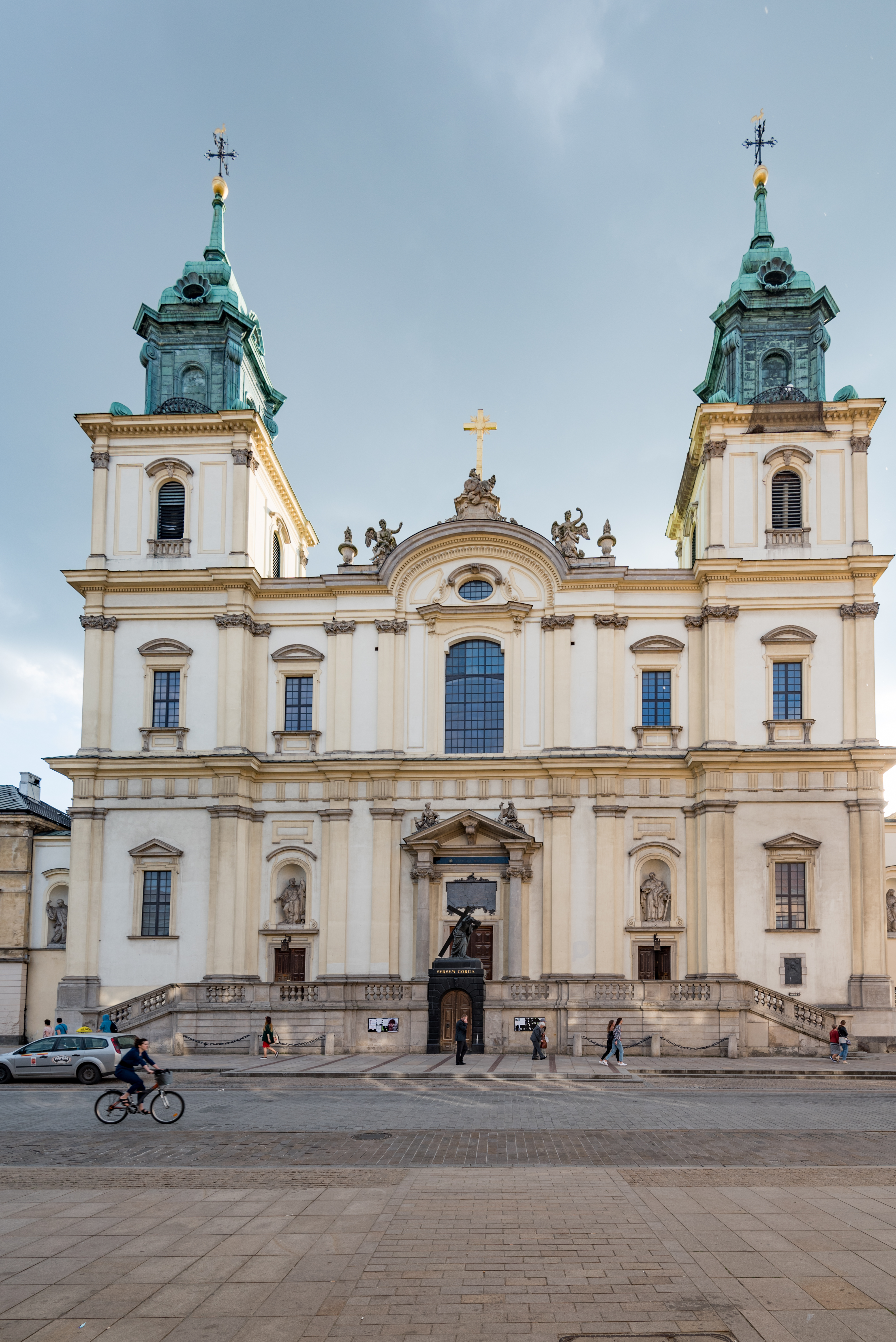 Warszawa, Kościół św. Krzyża, ul. Krakowskie Przedmieście 3